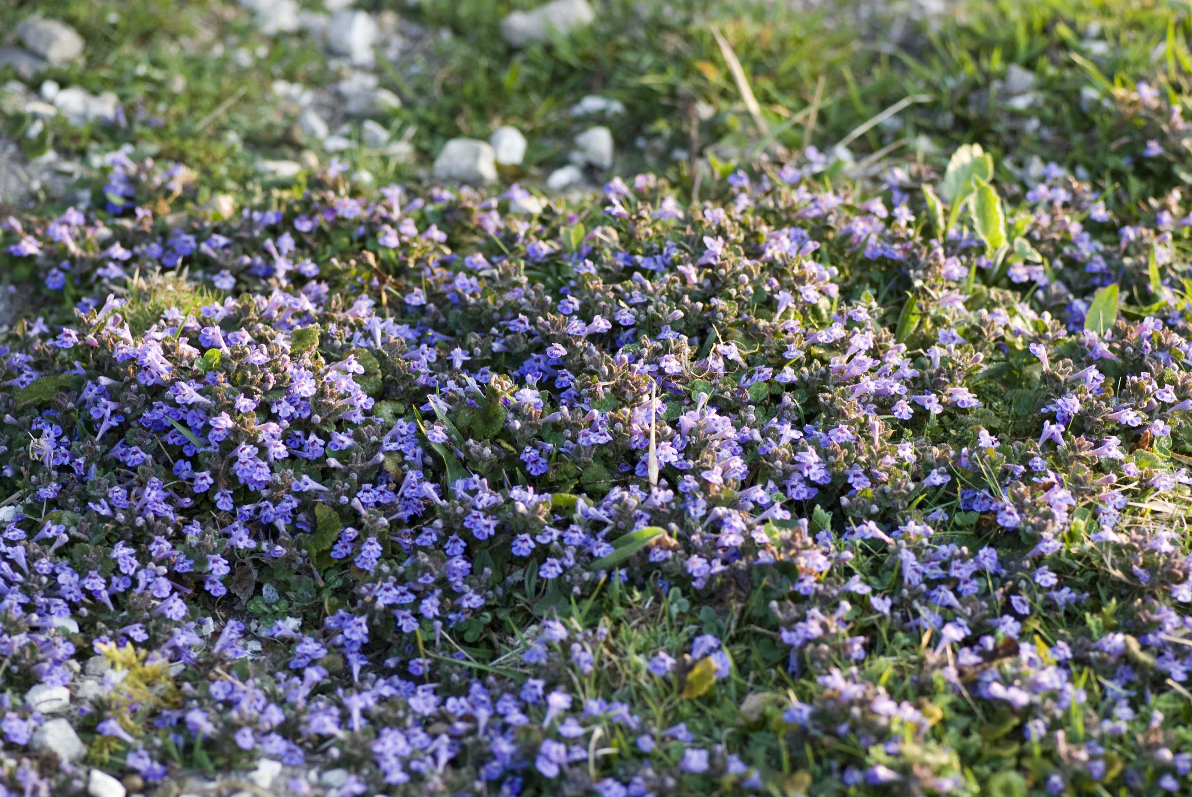 Glechoma hederacea Ancien camp militaire Saint-Fuscien à Dury (Somme), France